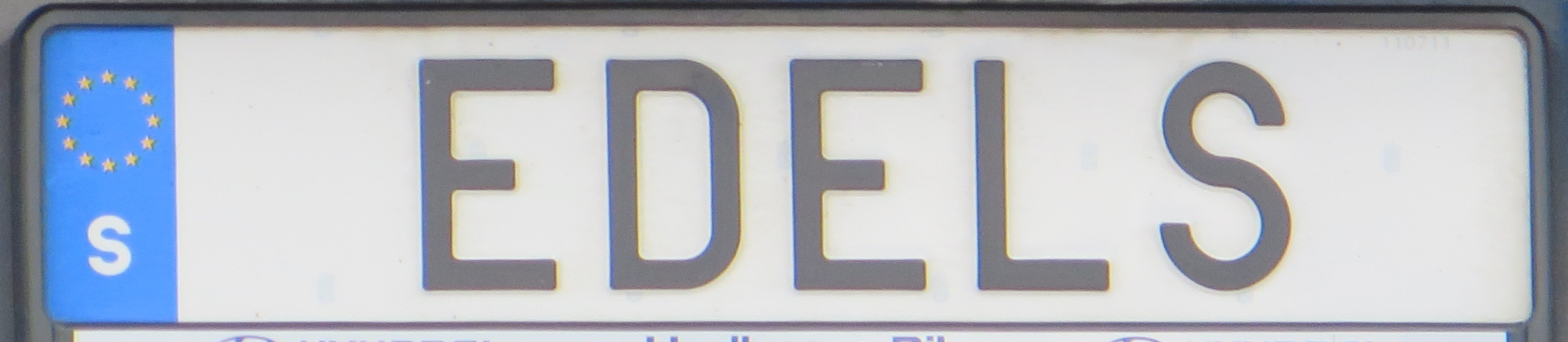 persoonlijke kentekenplaat Zweden